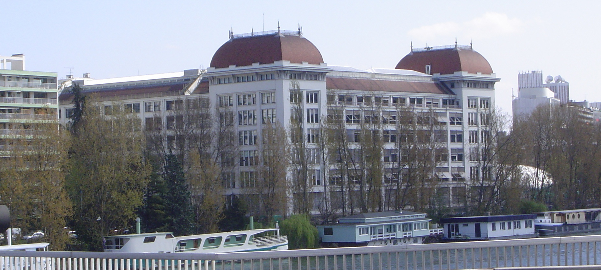 Bâtiment de la société Thomson SA (anciennement siège de ITT puis LMT, puis LMT-RP, puis Thomson-CSF)